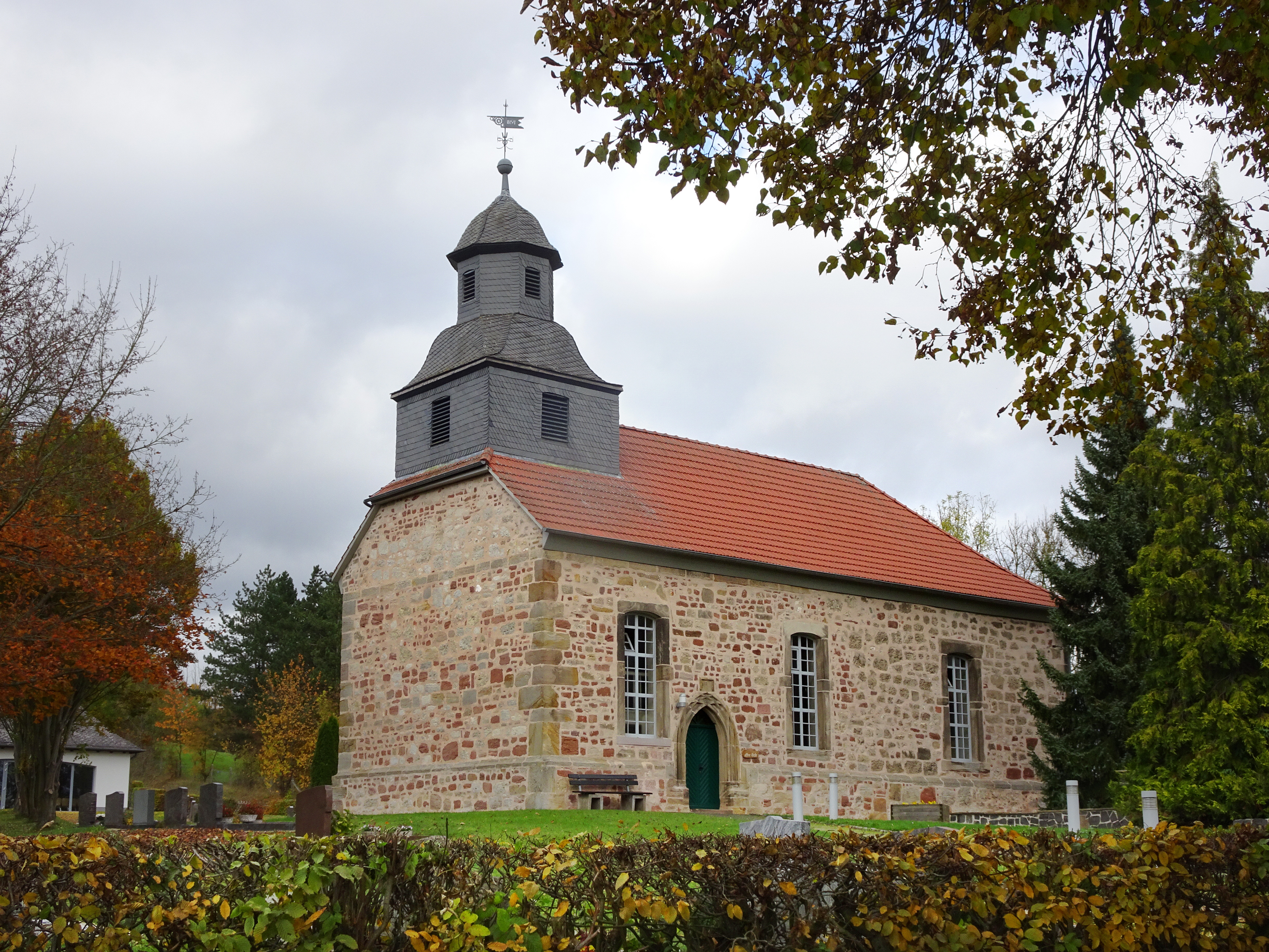 Die evangelische Kirche von Eltmannshausen ist ein spätgotischer Bau aus dem Jahr 1519. In 1697 wurde das Kirchenschiff durch Abbruch des Chores vergrößert. Später, in 1781 wurde sie zu einer schlichten Saalkirche mit Giebeldachreiter und dreiseitigen Emporen umgebaut. Die Kirche ist ein Kulturdenkmal aufgrund ihrer geschichtlichen Bedeutung.